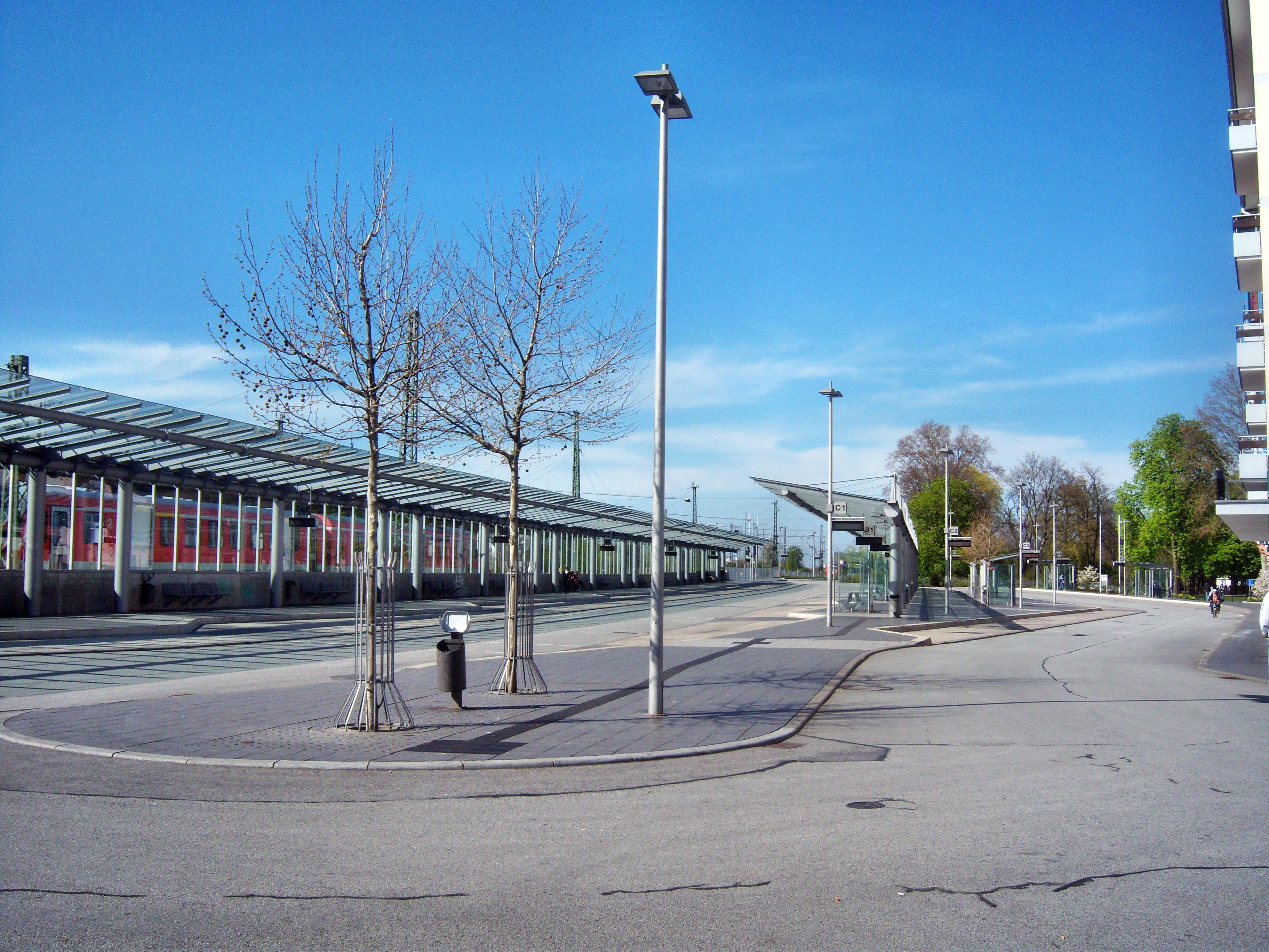 Wormser Busbahnhof, neben dem Wormser Hauptbahnhof